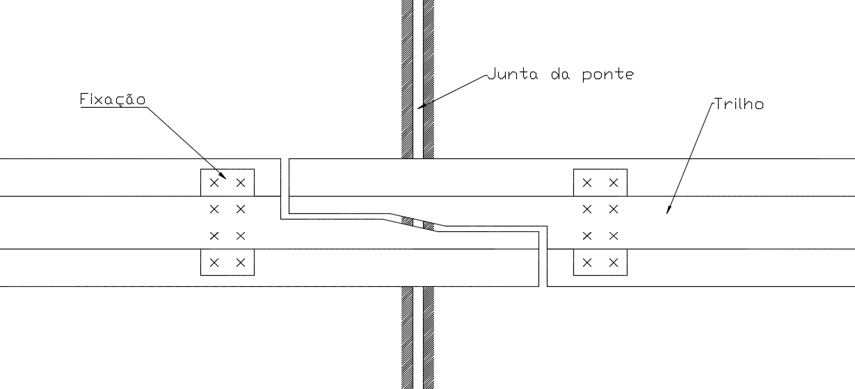 Esquema simplificado de uma junta de dilatação em ponte ferroviária